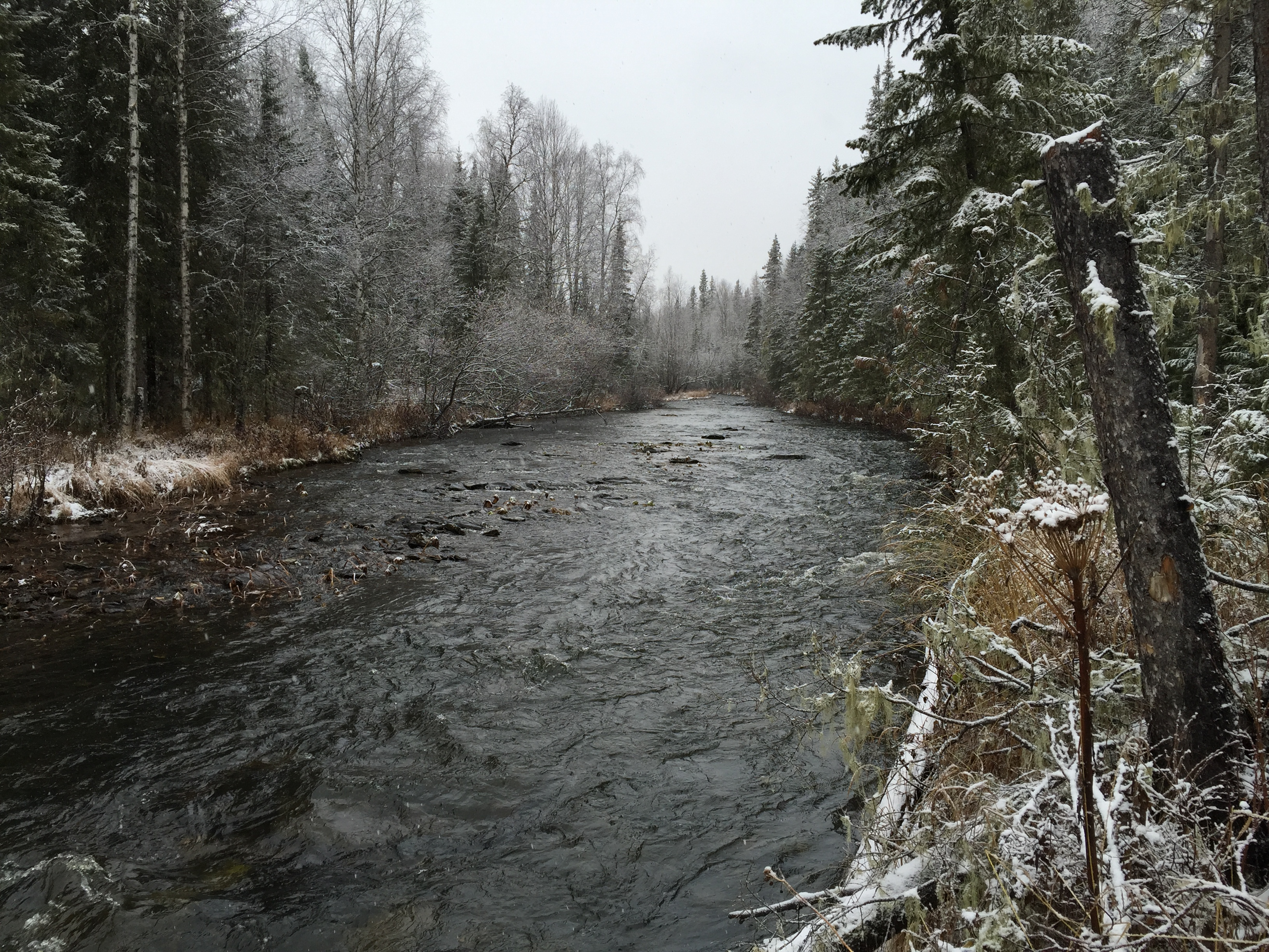 река Ауспия, 2015 год